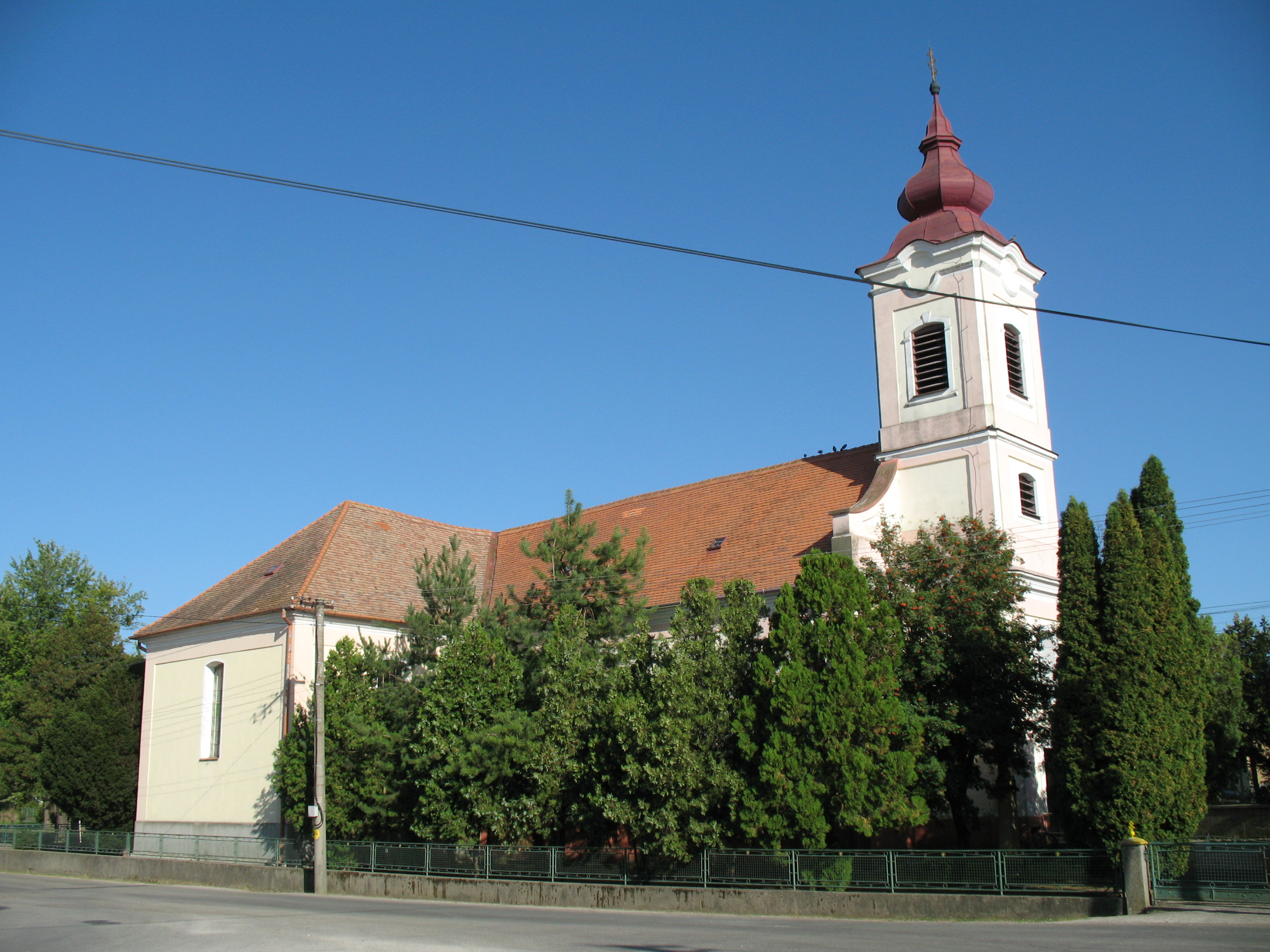 Szelőce